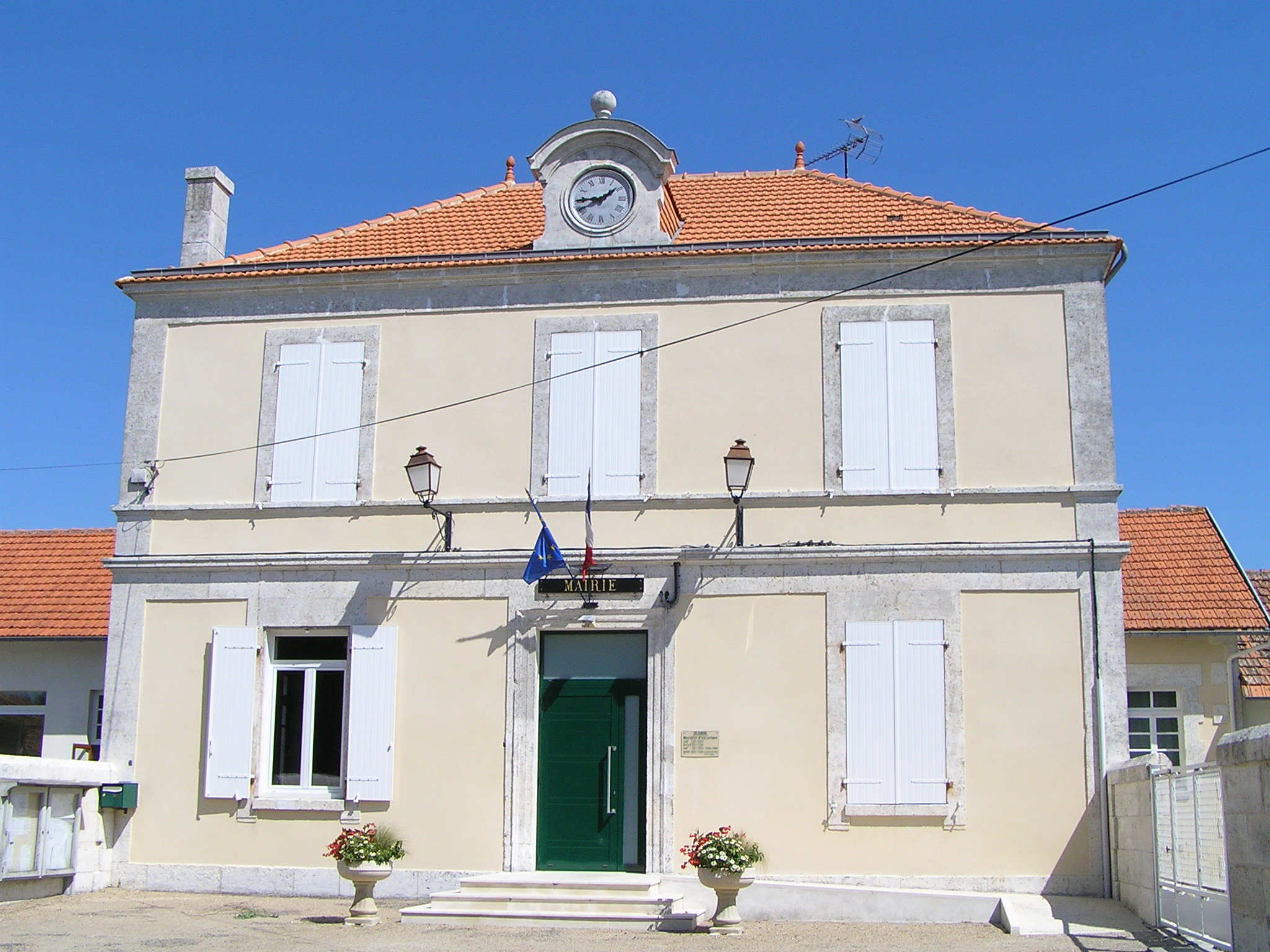 mairie de Jurignac